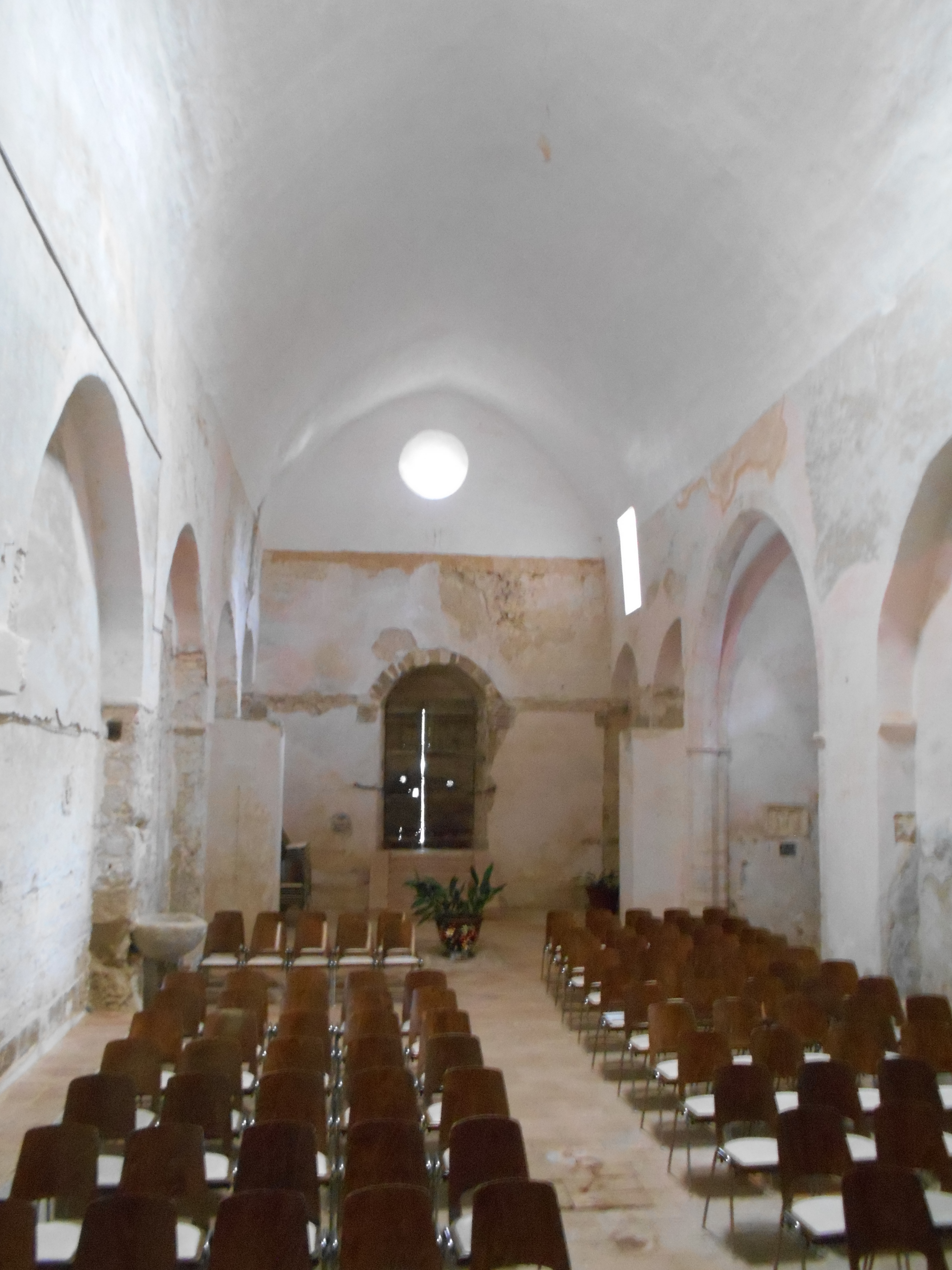 Interior de l'església de Santa Maria del Camp